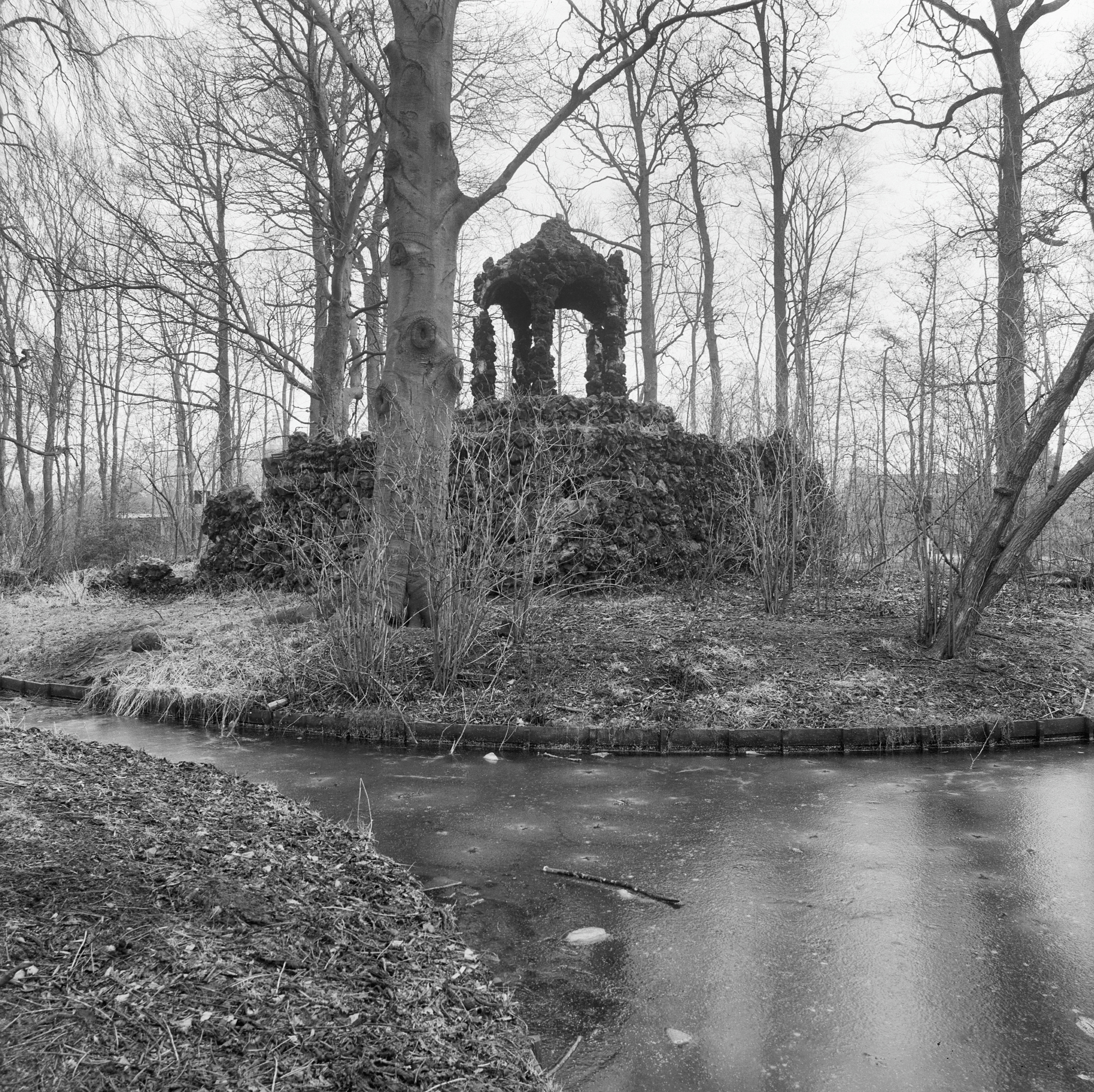 MUSEUM BISDOM VAN VLIST: Exterieur RUINE GROT IN OVERTUIN